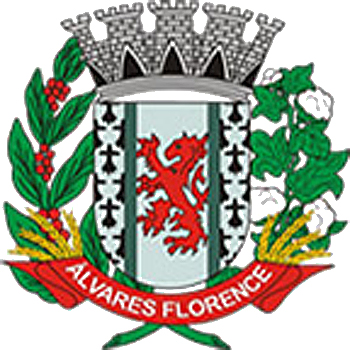 Brasão do município de: Álvares Florence, São Paulo, Brasil